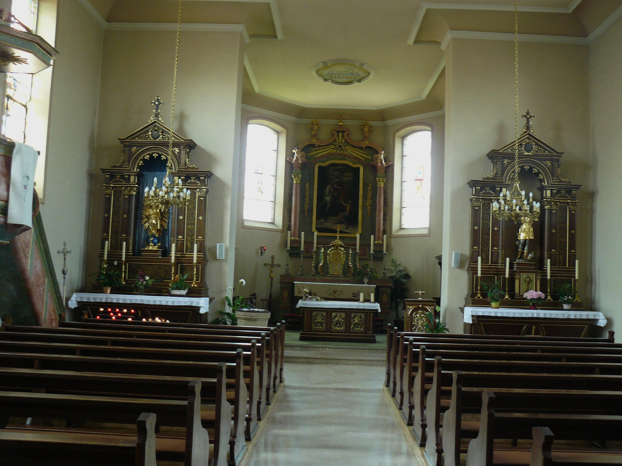 Innenheim (Bas-Rhin, France),intérieur de l'église Saint-Martin, maître-autel (XVIIIe) inscrit M.H., autels secondaires (XIXe)